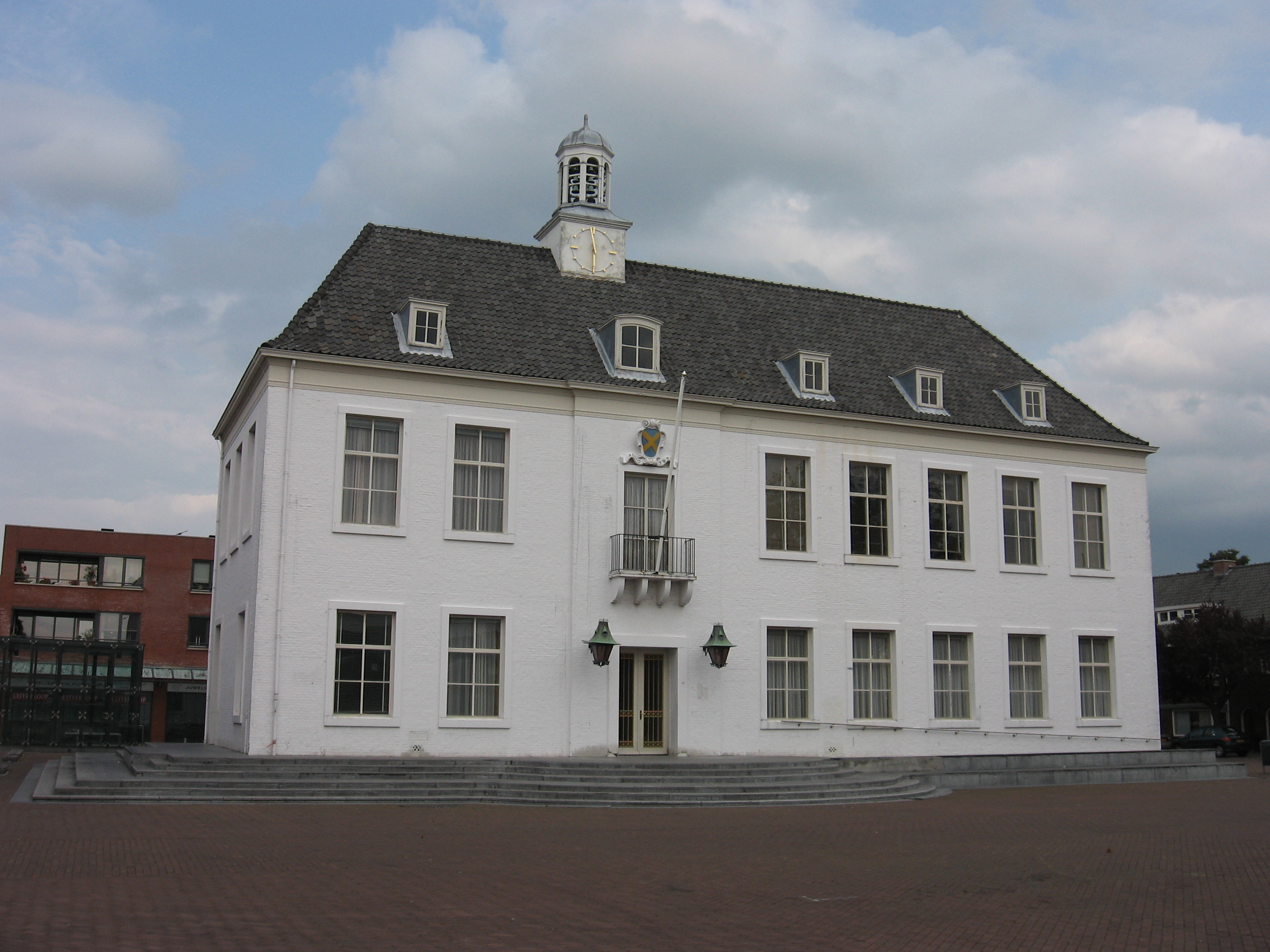 Pijnacker